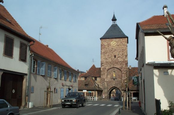 Porte des Forgerons - Molsheim (Bas-Rhin)